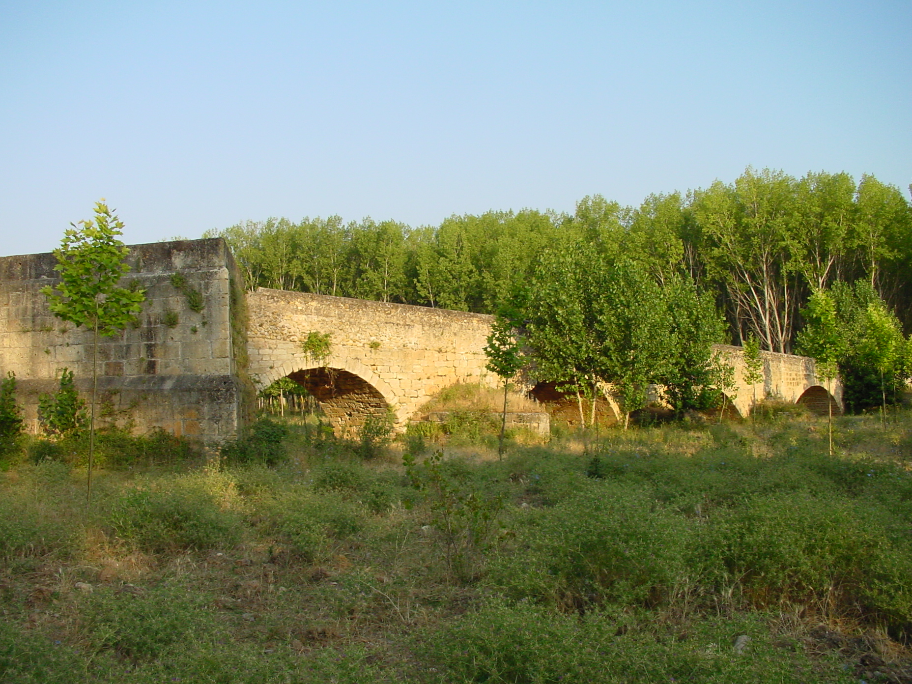 Puente romano en Talamanca de Jarama